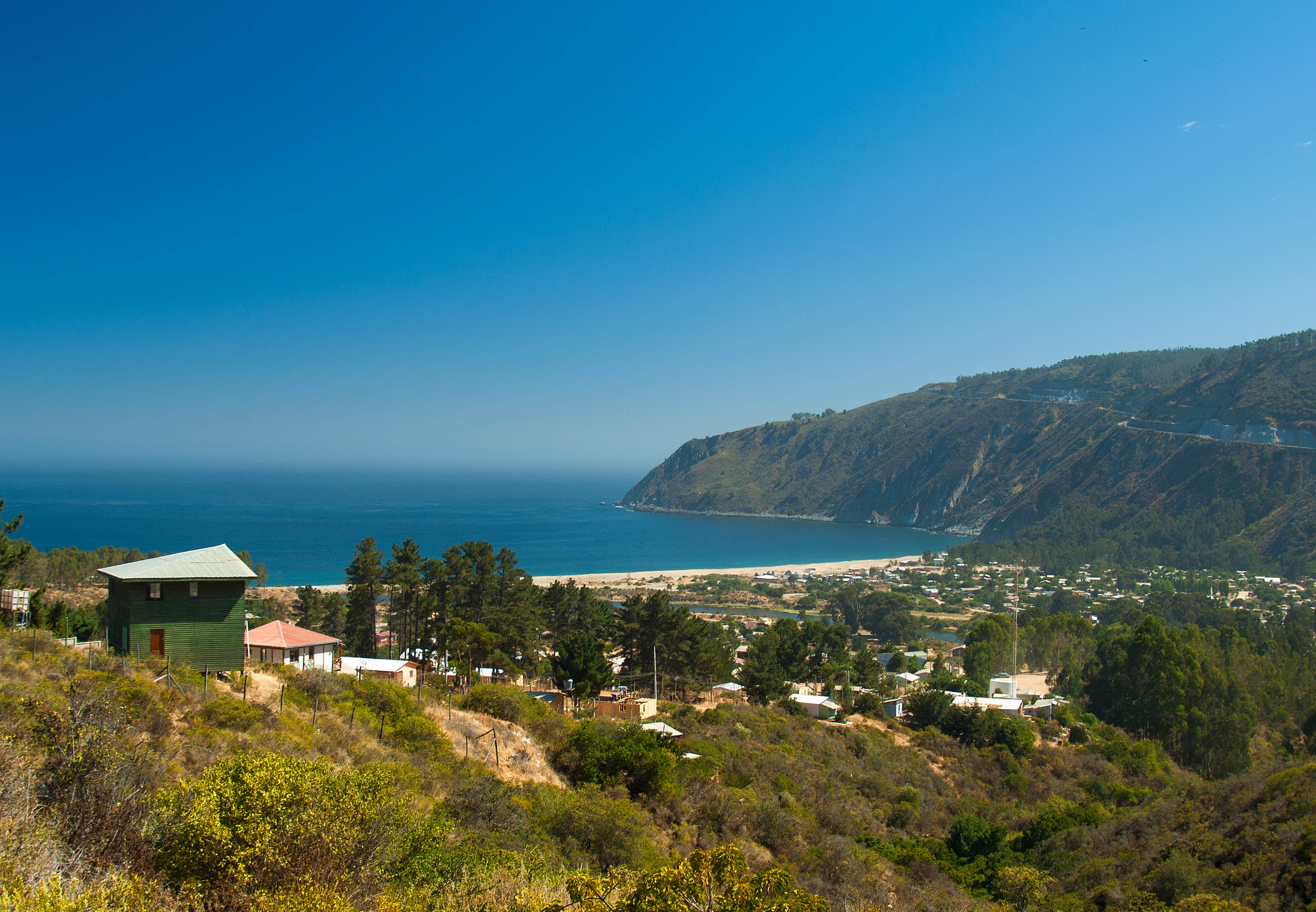 Acantilados Federico Santa María This is a photo of a national monument in Chile: 1988